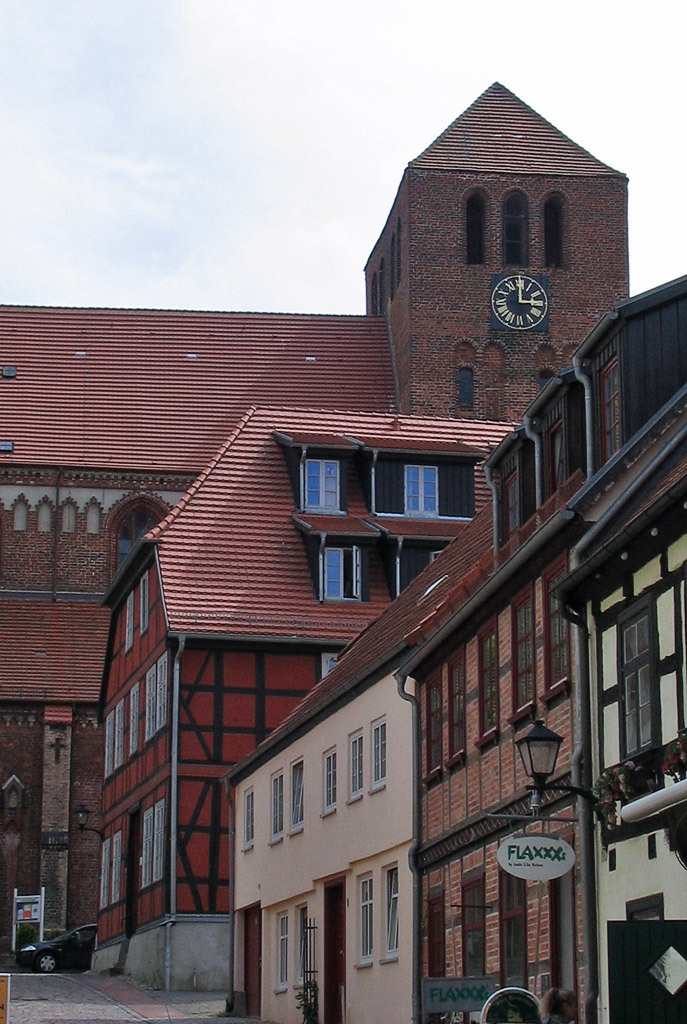 Beschreibung: Waren (Müritz) - Georgienkirche Fotograf: Darkone, 14. Mai 2005